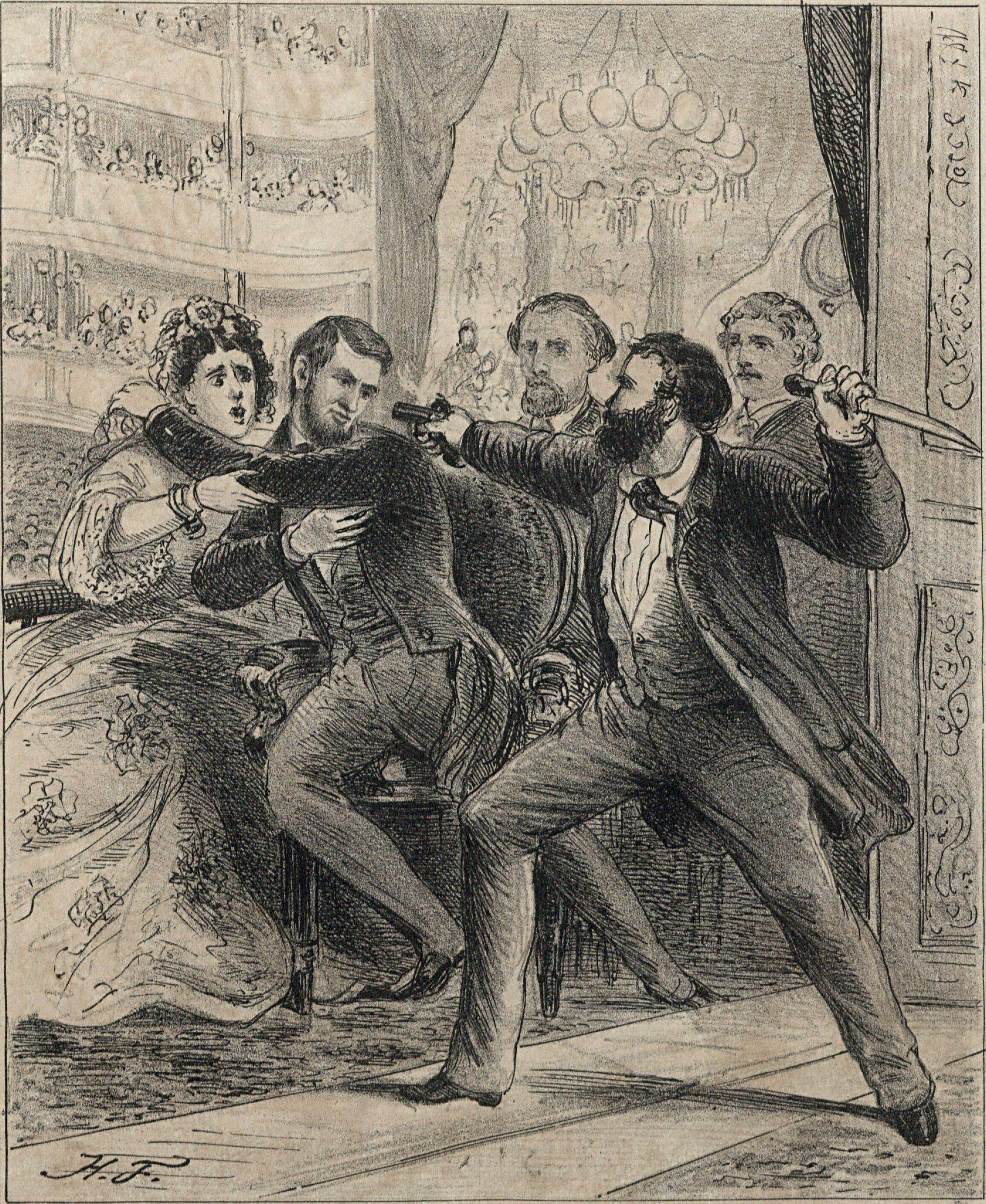 O Presidente Lincoln dos Estados Unidos da América do Norte assassinado na noite de 14 de abril no Theatro Ford